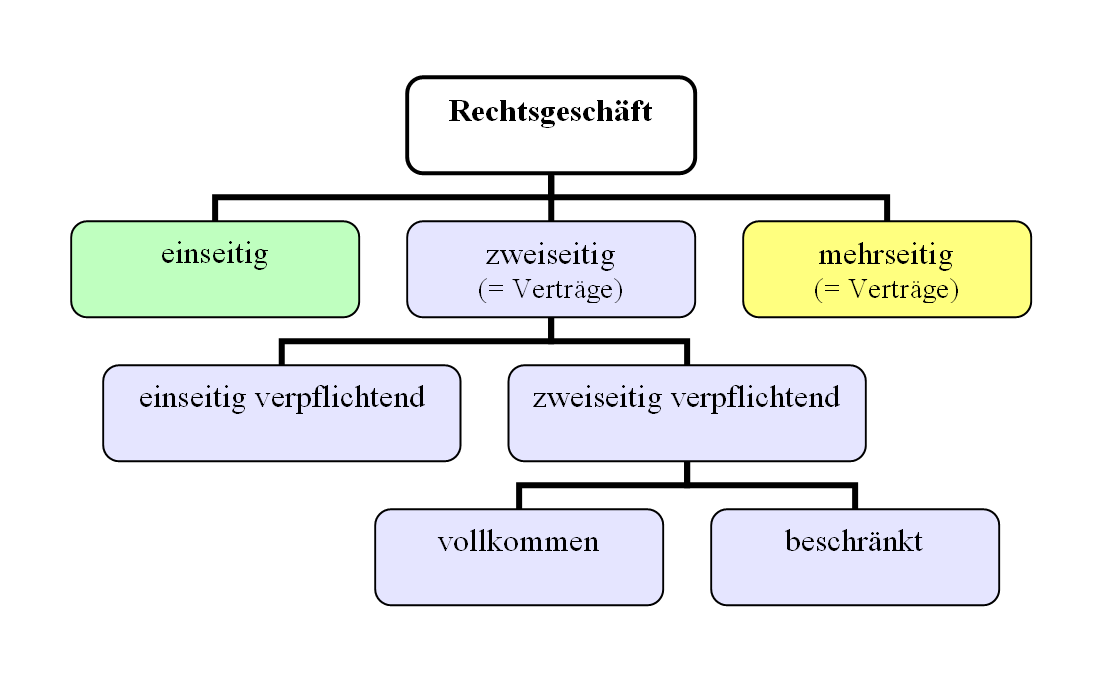 Einteilung der Rechtsgeschäfte